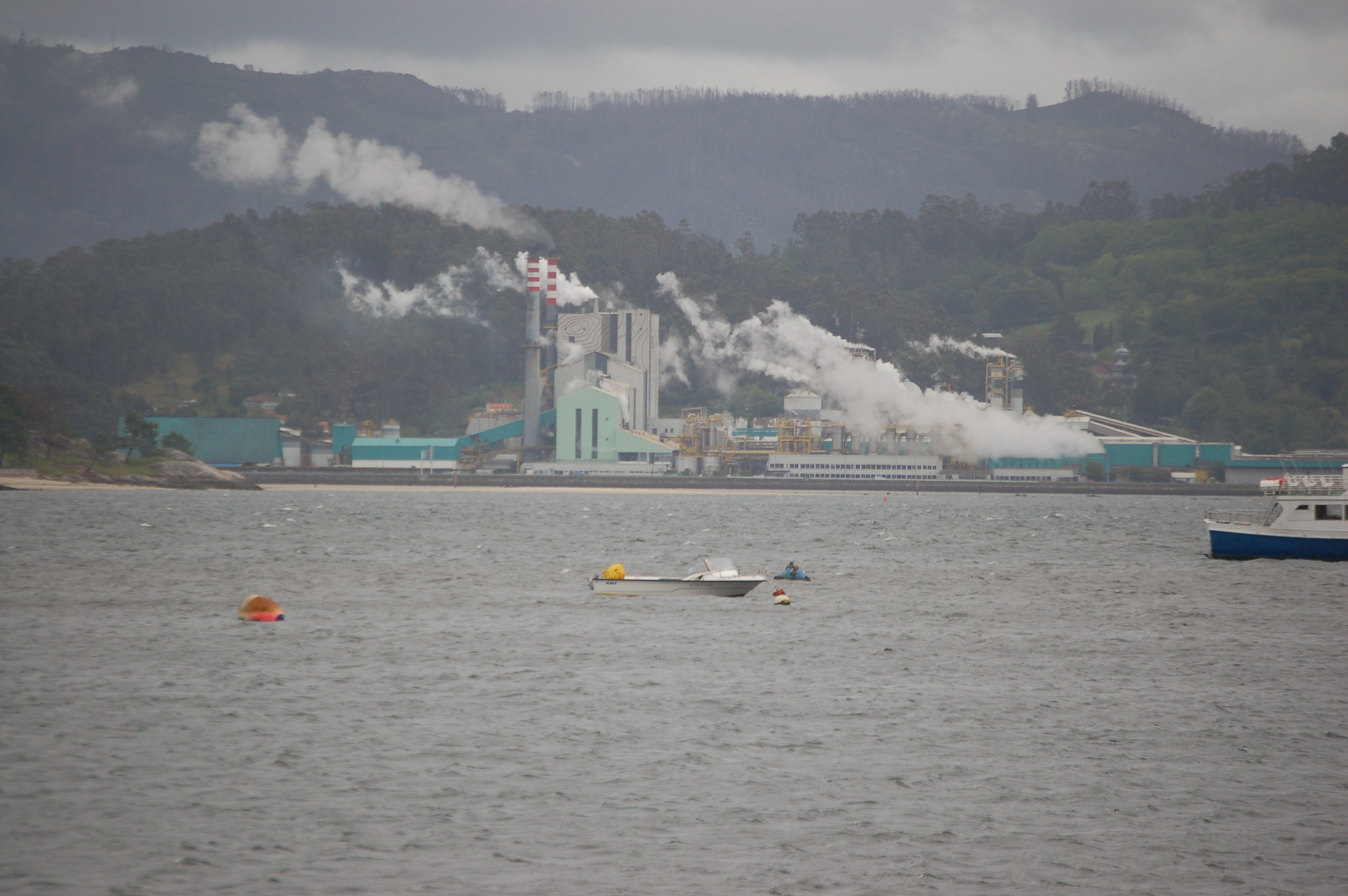 Complexo industrial de ENCE-ELNOSA en Lourizán, xunto á ría de Pontevedra, desde Samieira (Poio)